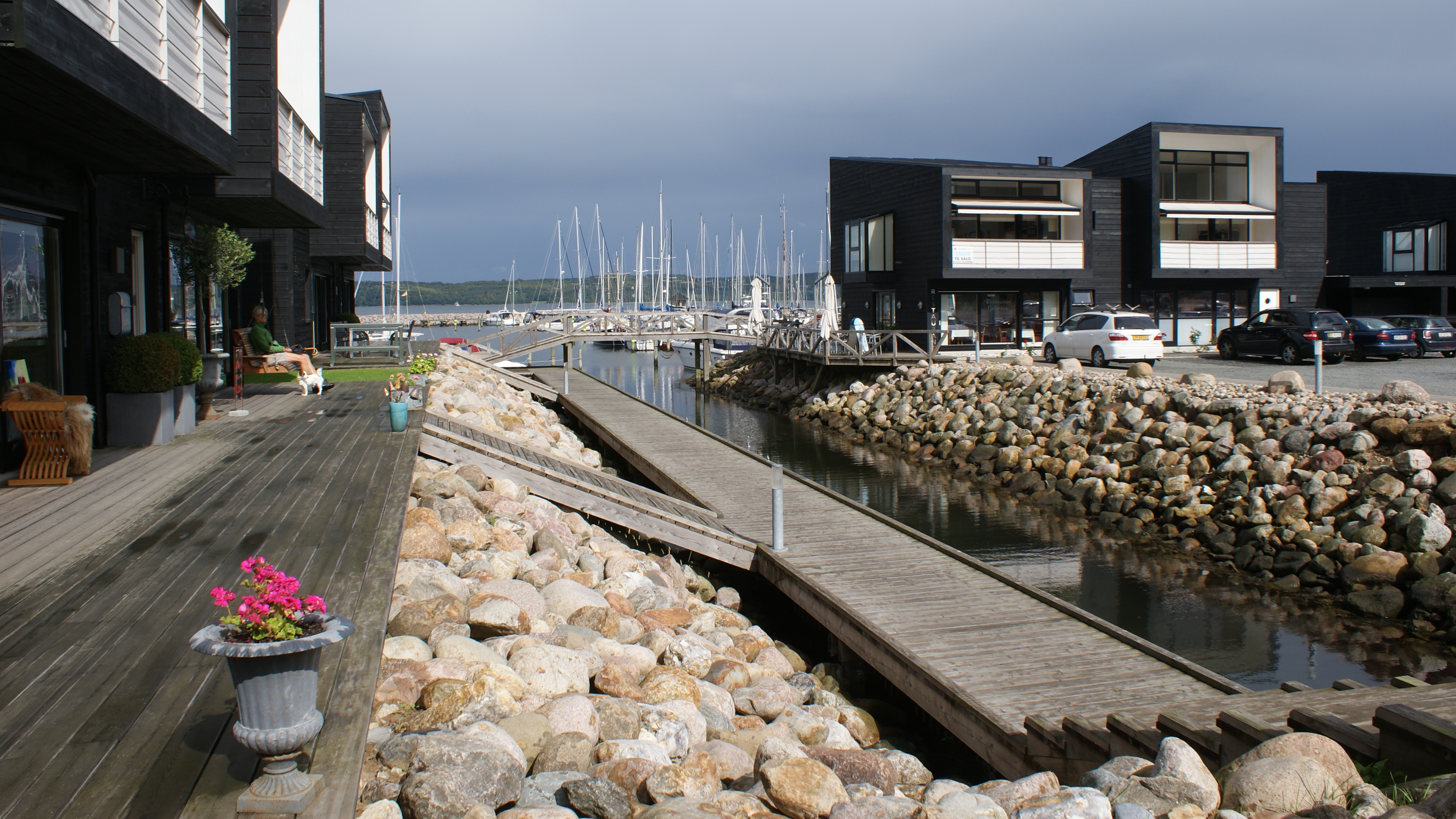 Bregning havn